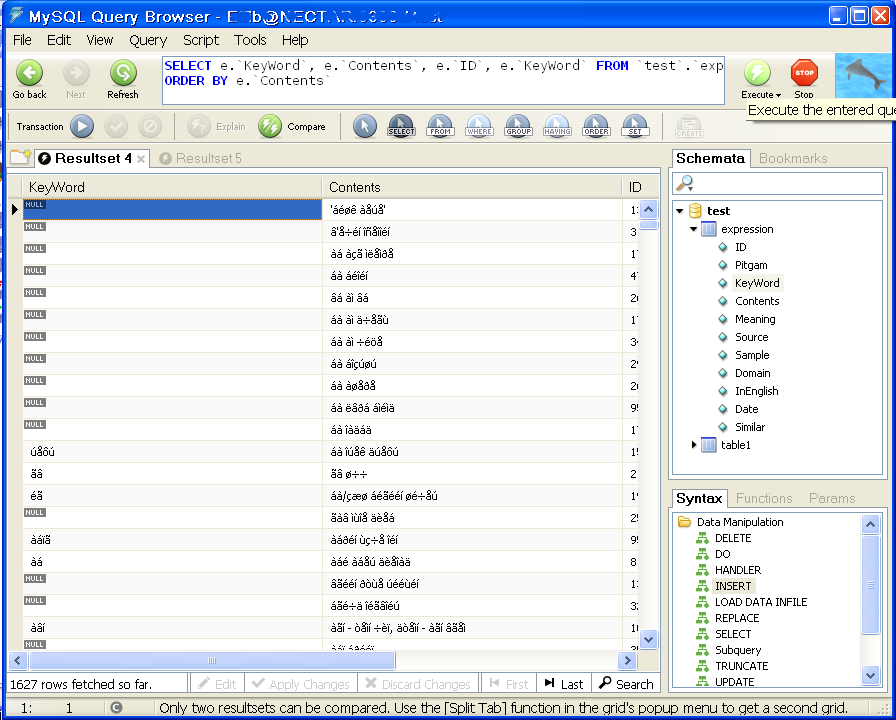 תמונת מסך של דפדפן השאילתות של MySql. צולם על יד.